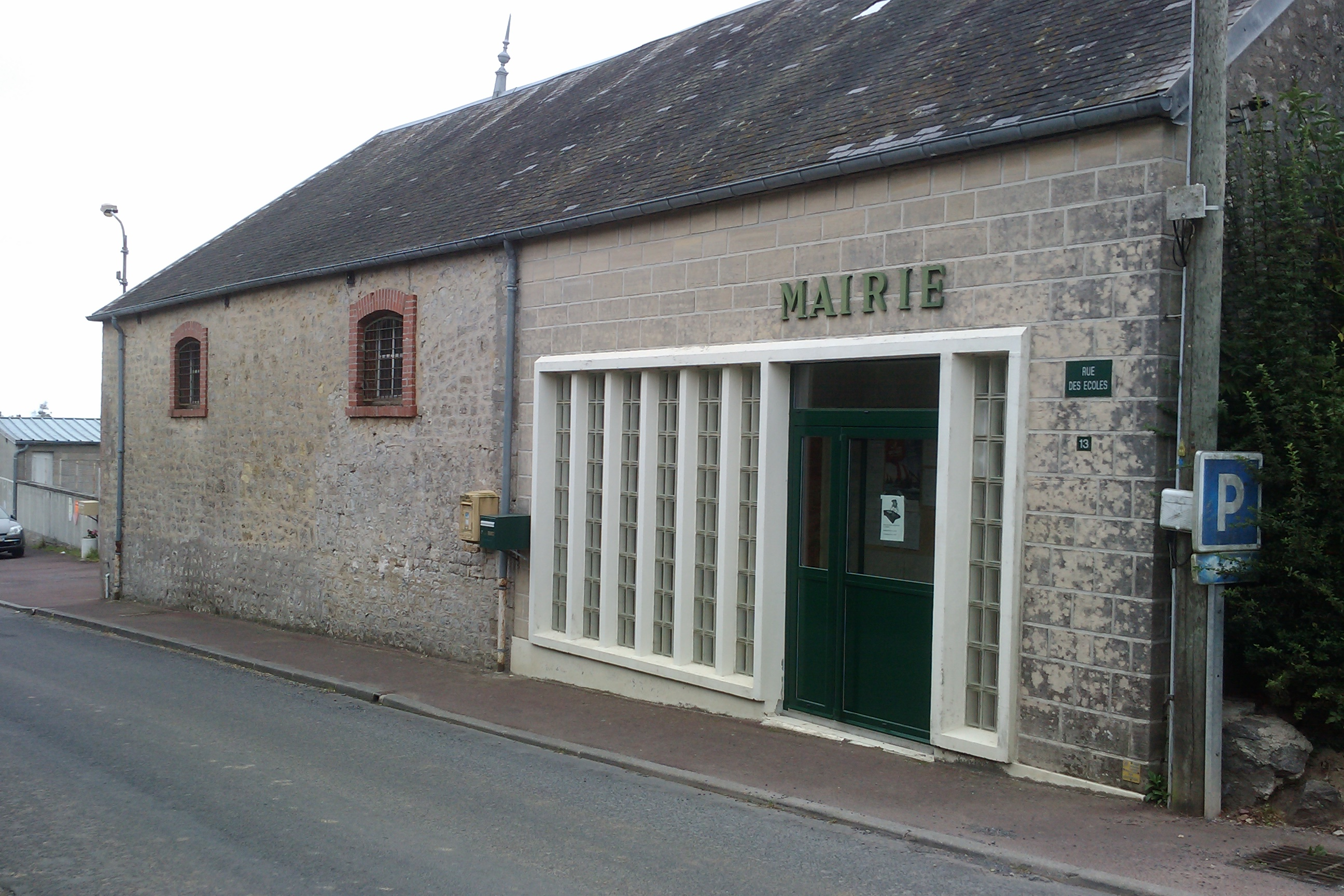 Mairie de Brévands